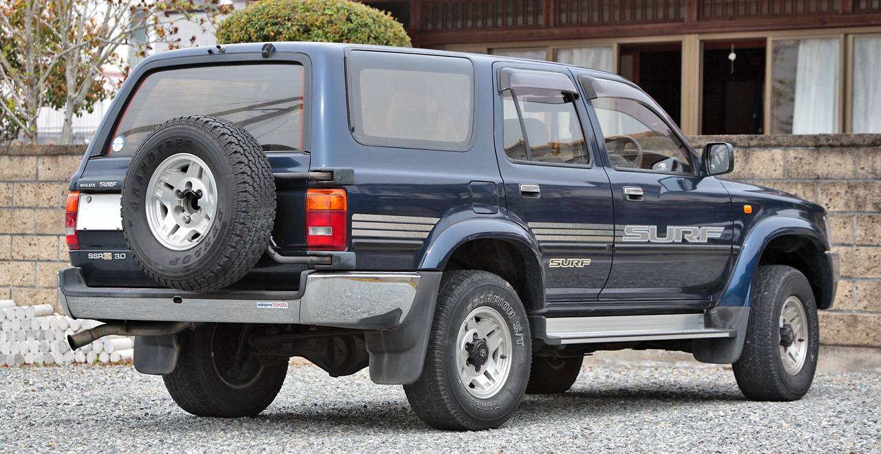 Toyota Hilux Surf 3.0DT SSR-X ( KZN130G )